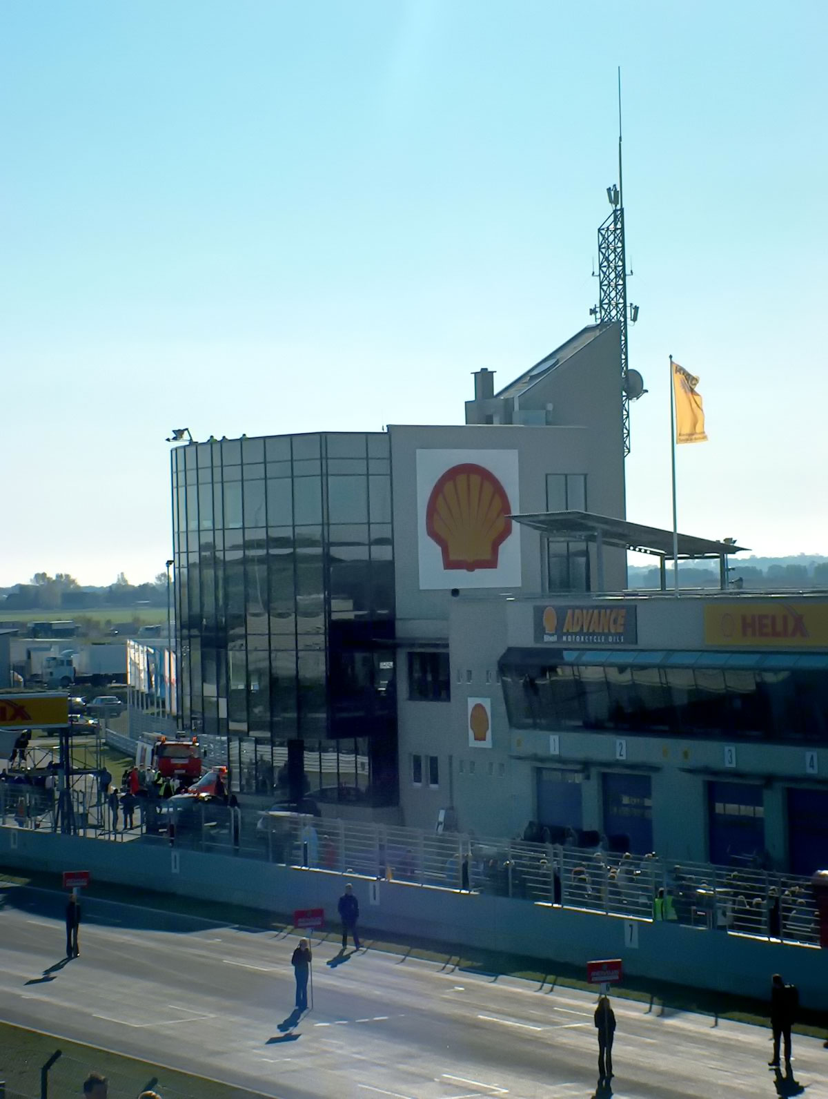 GNU-FDL selbst fotographiert